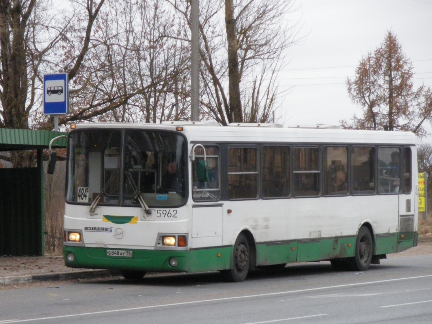 Ленинградская область, Ломоносовский район, деревня Кипень, Нарвское шоссе. Автобус следующий по маршруту 484Б остановился на остановке «Кипень». Дата съёмки - 4 ноября 2009 г. Автор - Роговиков Николай.